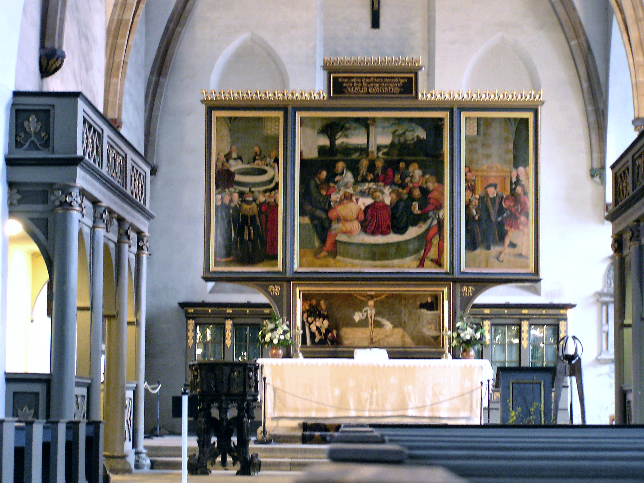 Stadtkirche, Wittenberg, mit Cranach Alterbild